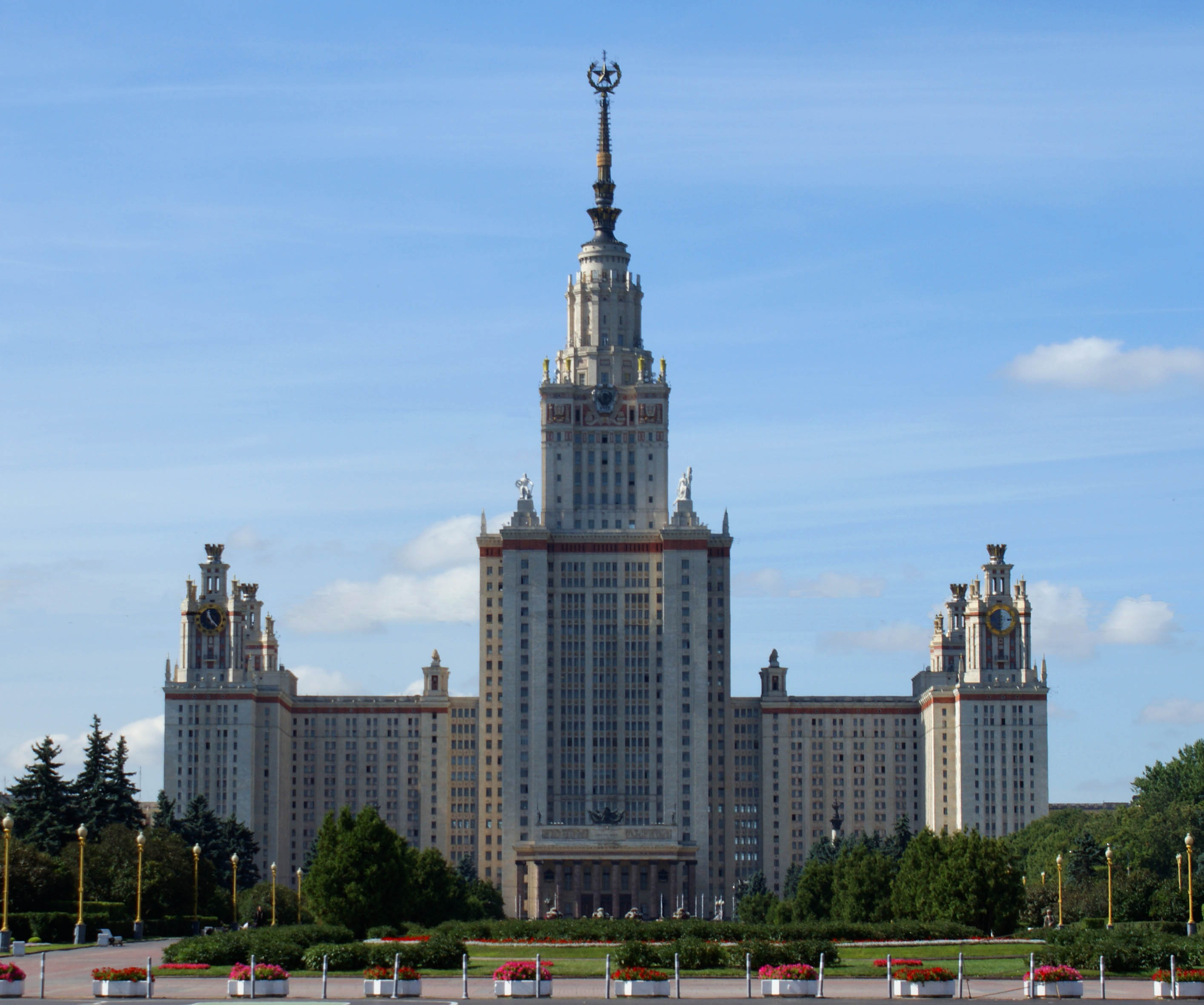 (lb): Haaptgebai vun der Lomonossow-Universitéit zu Moskau. (ru): Главное здание МГУ.